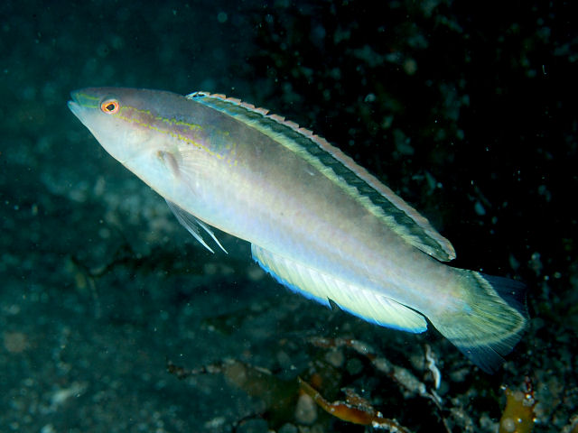 イトベラ Suezichthys gracilis